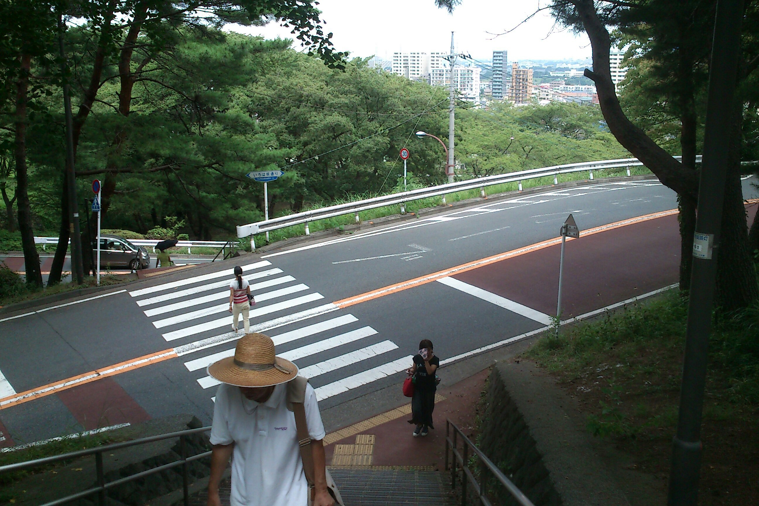 多摩市「いろは坂」の階段130806